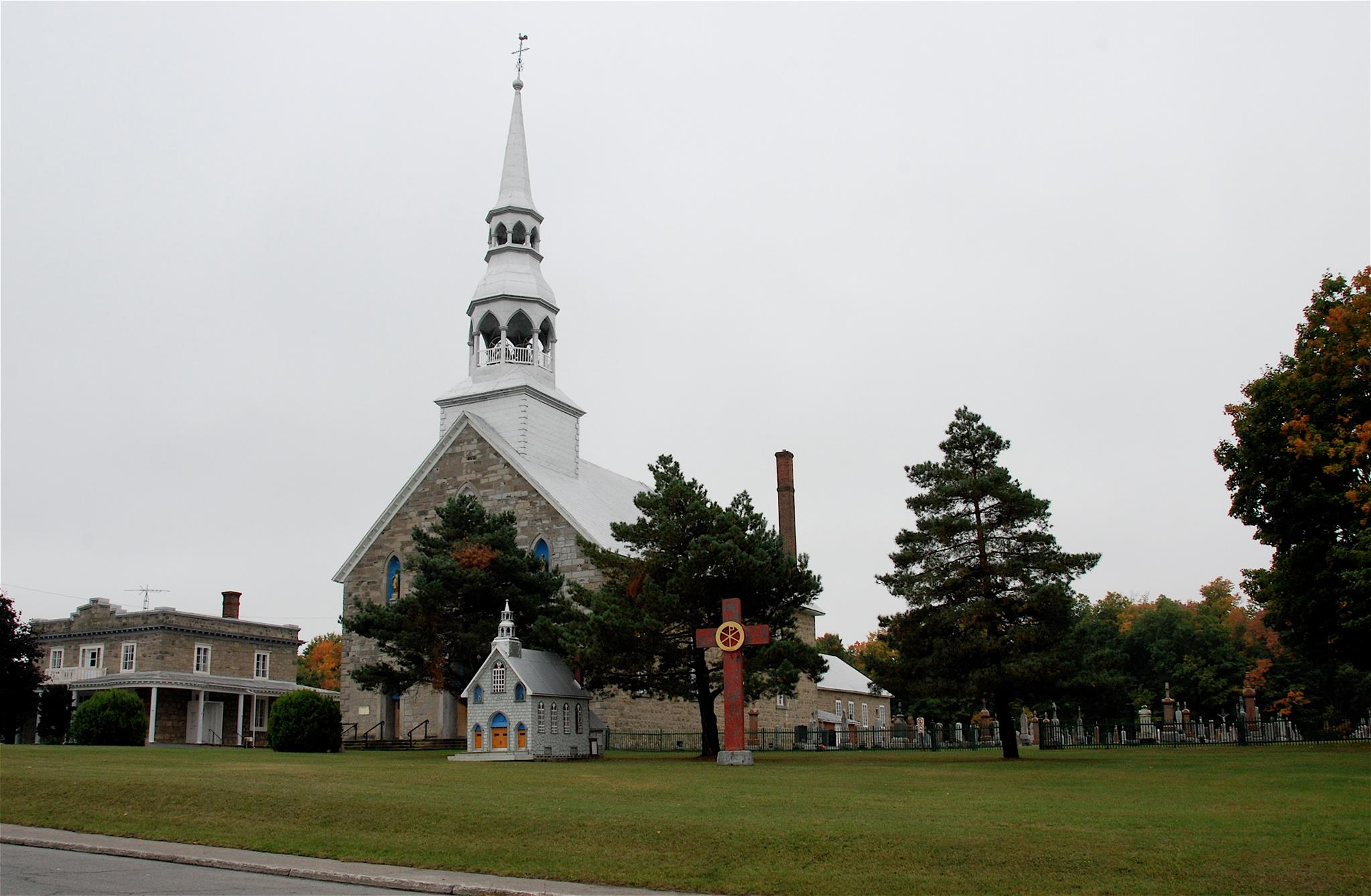 Photo de l'église et l'ancien presbitère de la municipalité de Sainte-Justine de Newton. Ces bâtiments sont au milieu du village de Sainte-Justine de Newton dans le 3e rang.